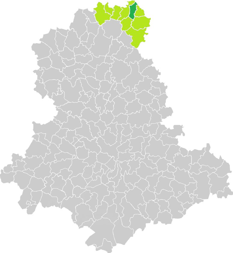 Carte de situation de la commune de Saint-Georges-les-Landes (en vert foncé) dans le votre Canton (en vert clair) sur une carte des communes de la Haute-Vienne